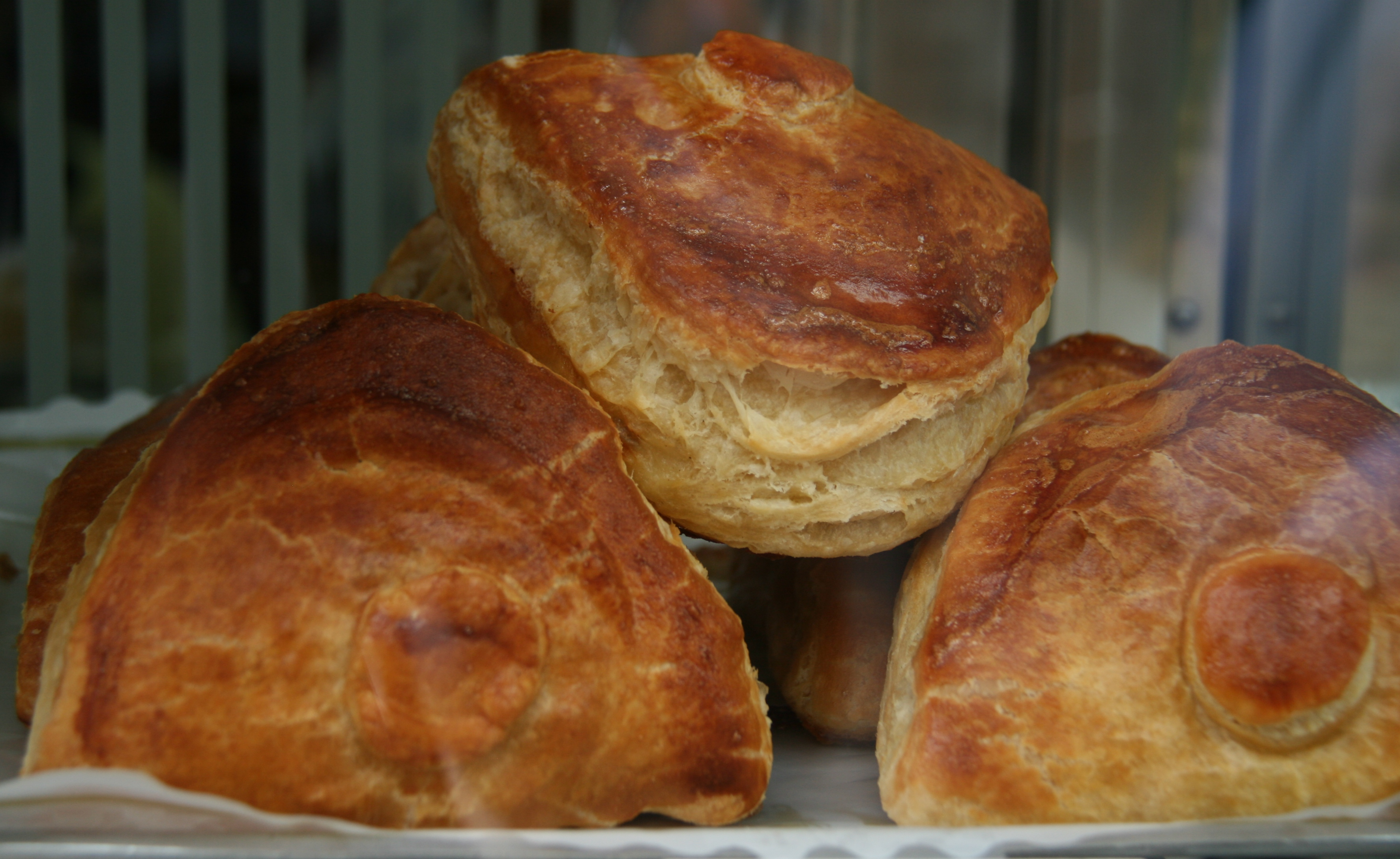 Empanadas de Atún (Hojaldre) - La Mallorquina (Madrid)